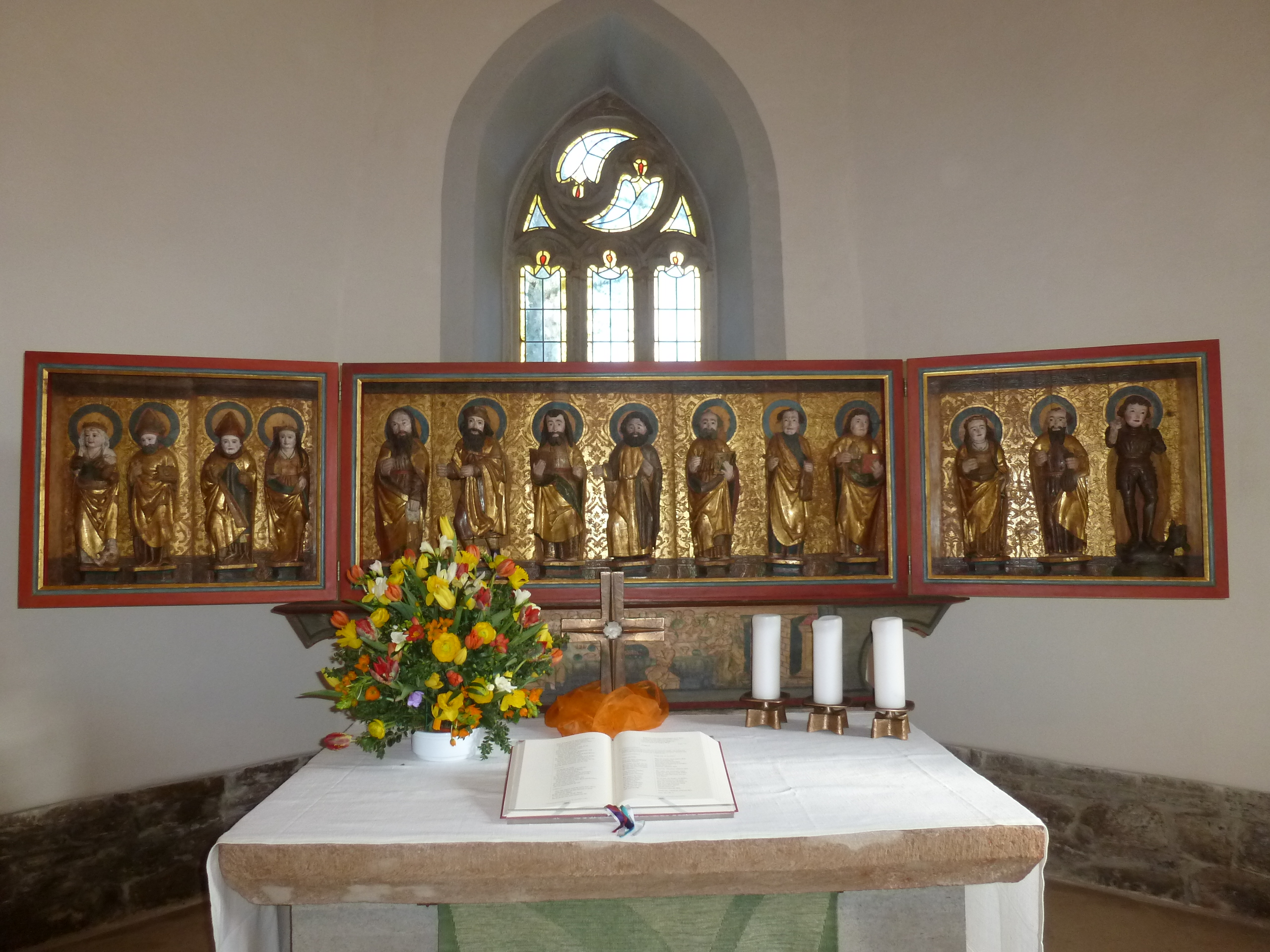 Altar der Evangelischen Kirche St. Gotthardt, Rohnstedt, Großenehrich, Thüringen, Deutschland